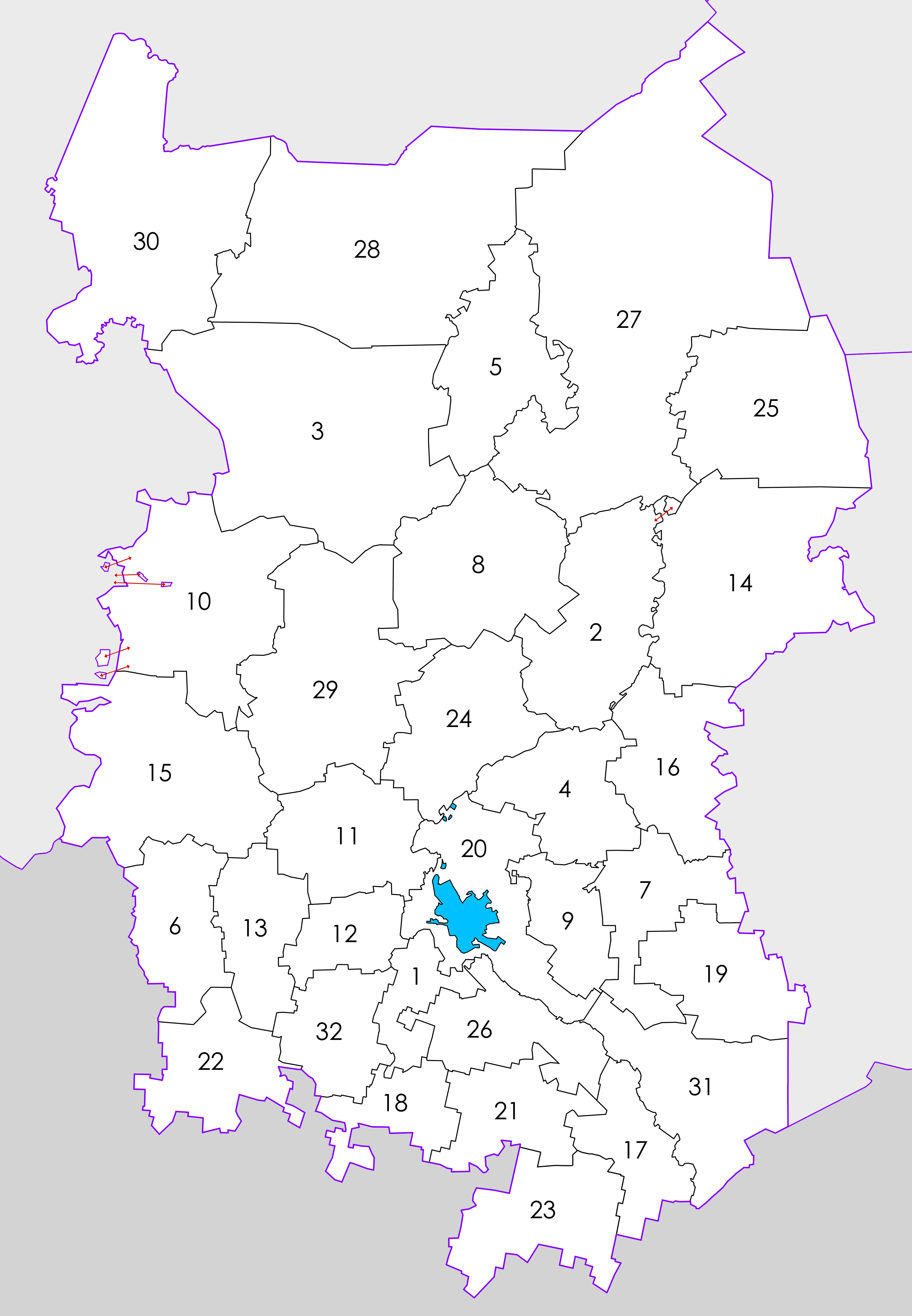 Административно-территориальное деление Омской области